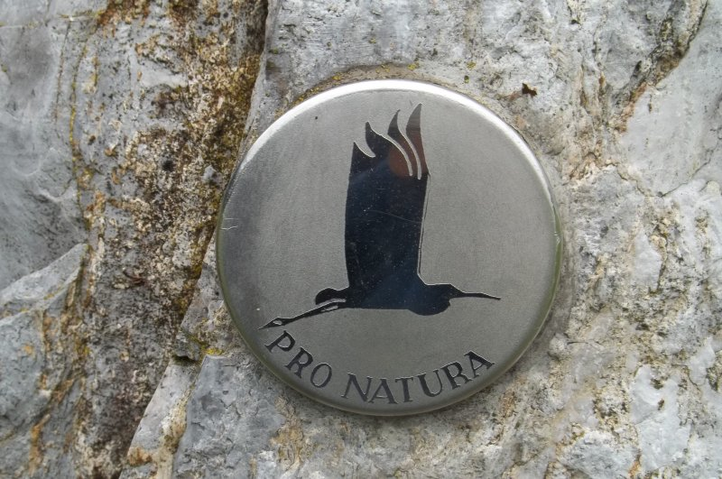 A Pro Natura emlékplakett a Less Nándor emléksziklán.